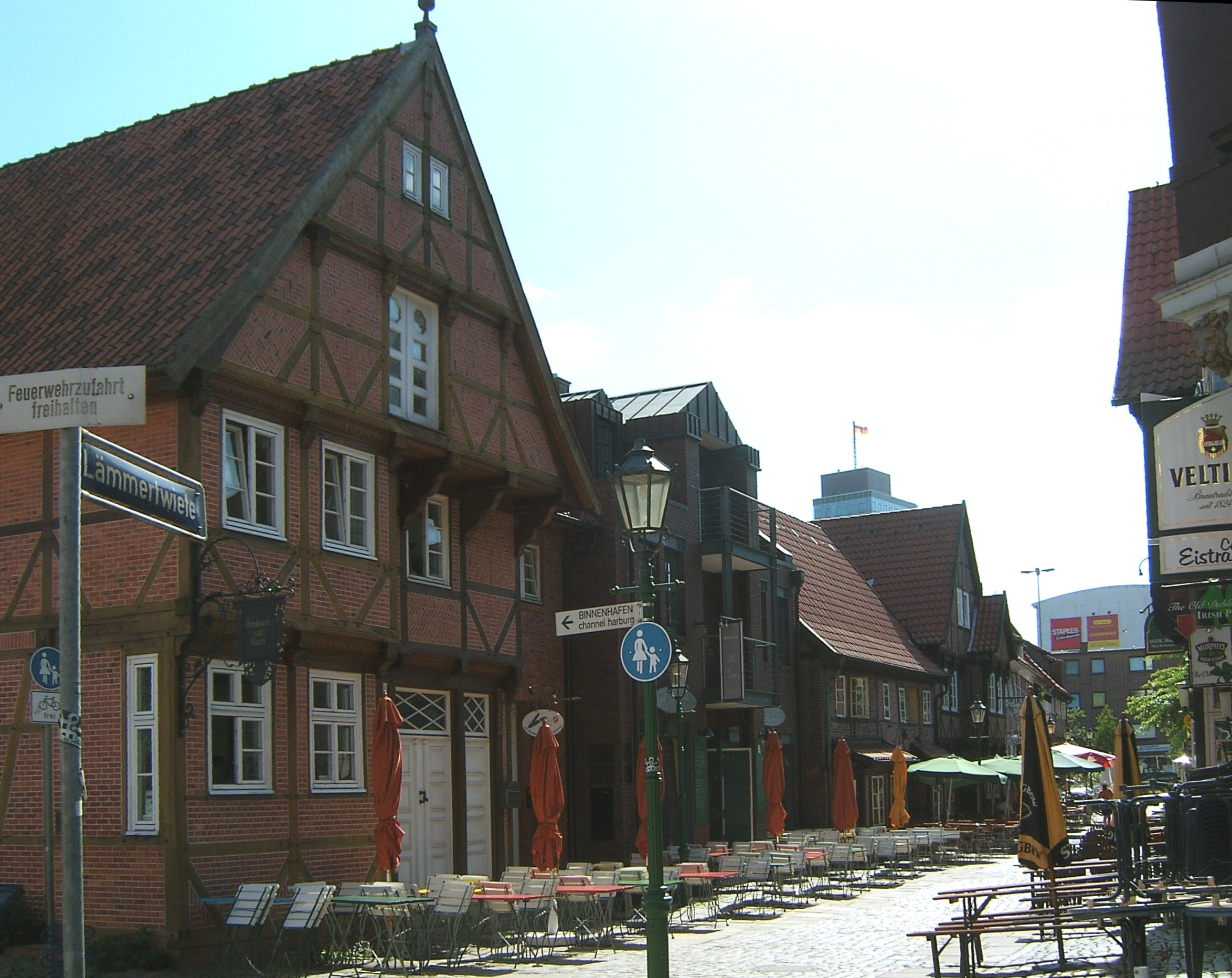 Die Lämmertwiete in Harburg wurde im 16. Jahrhundert bebaut und ist noch heute mit teils alten Fachwerkhäusern bestanden. Seit 1975 ist sie eine Fußgängerzone. In den Erdgeschossen der Gebäude finden sich vielfach Gaststätten.